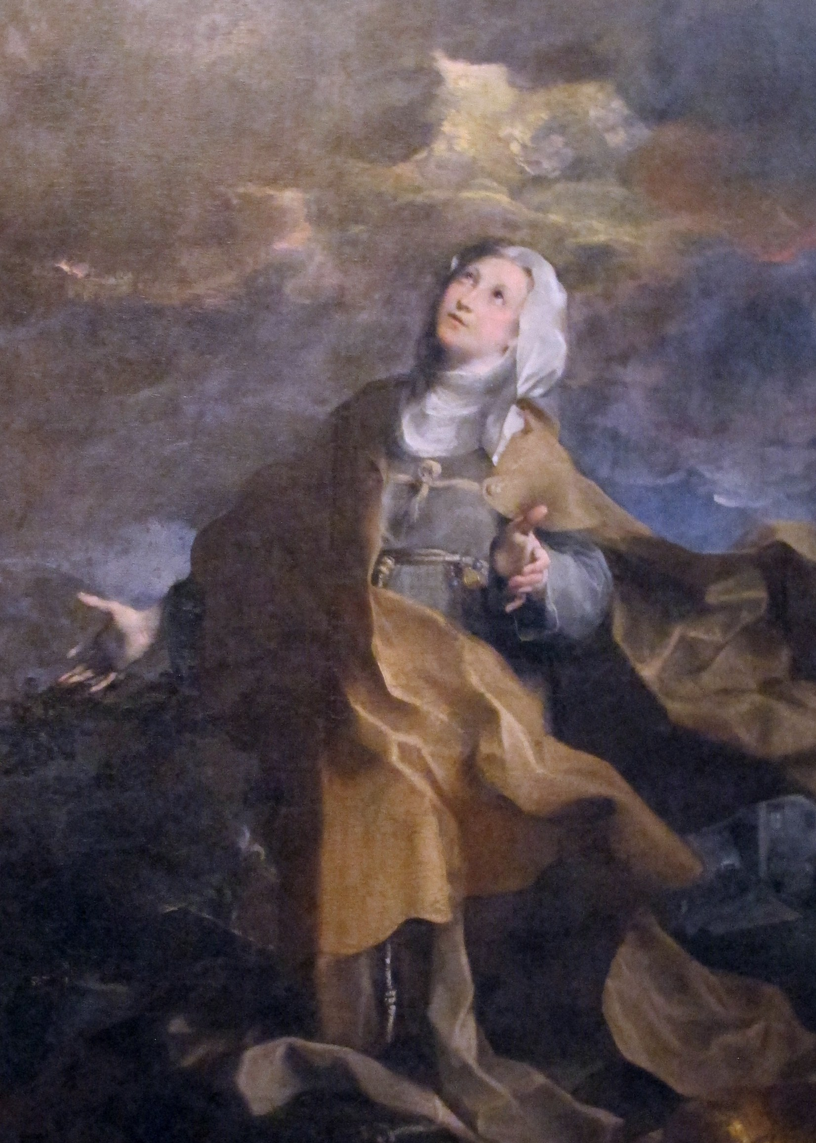 Michelina da Pesaro, ( Michelina Metelli) (Pesaro, 1300 - 1356) de Federico Barocci (Pinacothèque Vaticane)